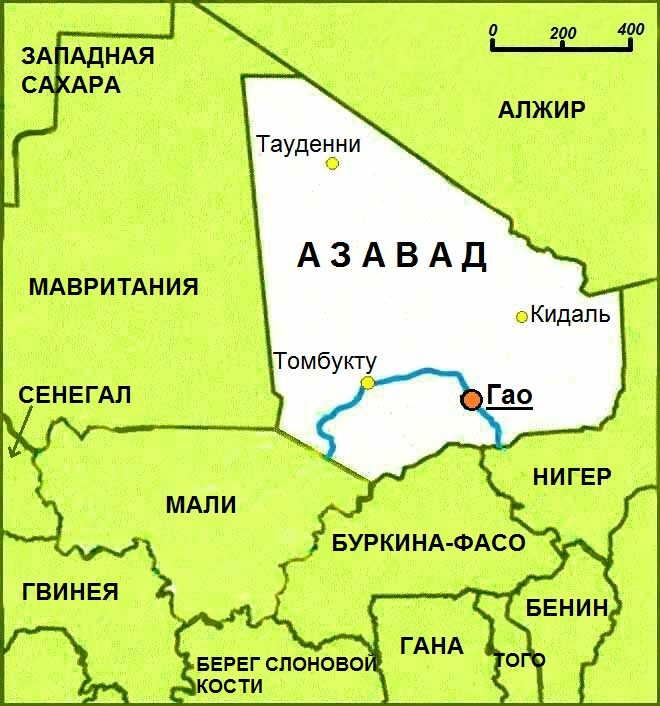 Азавад-карта